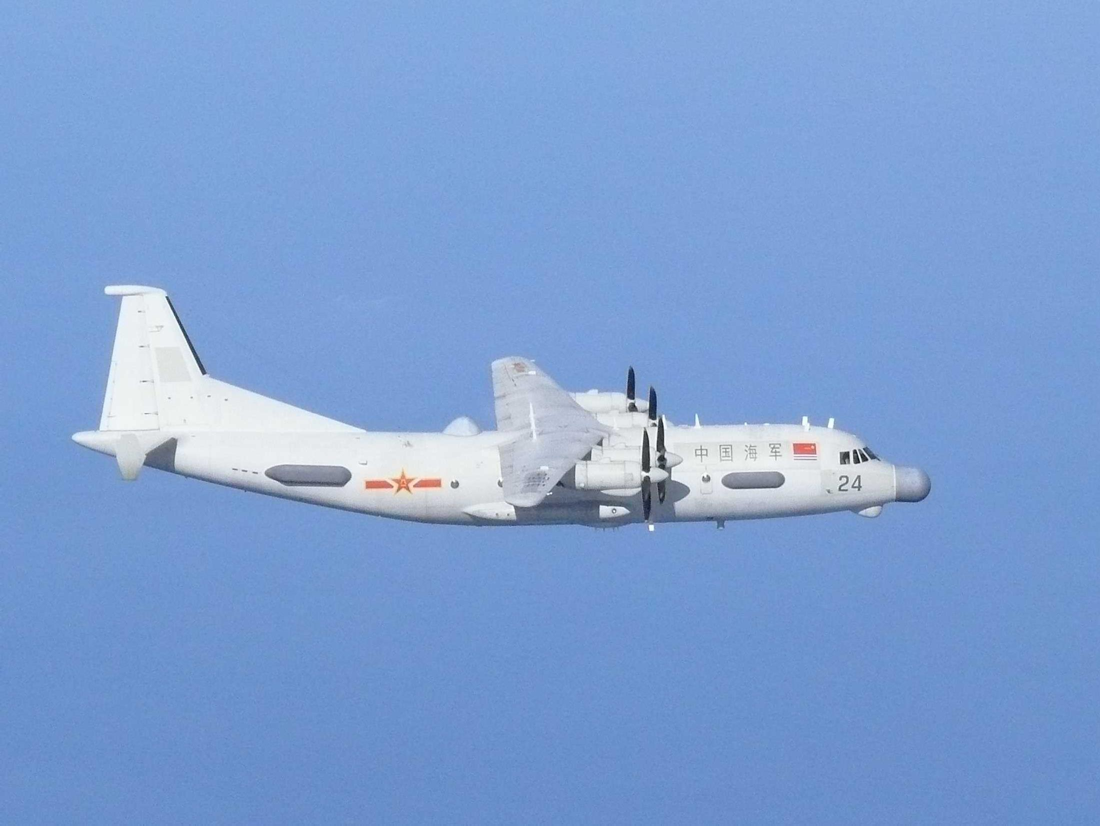 中国Ｙ－９型（情報収集機型）